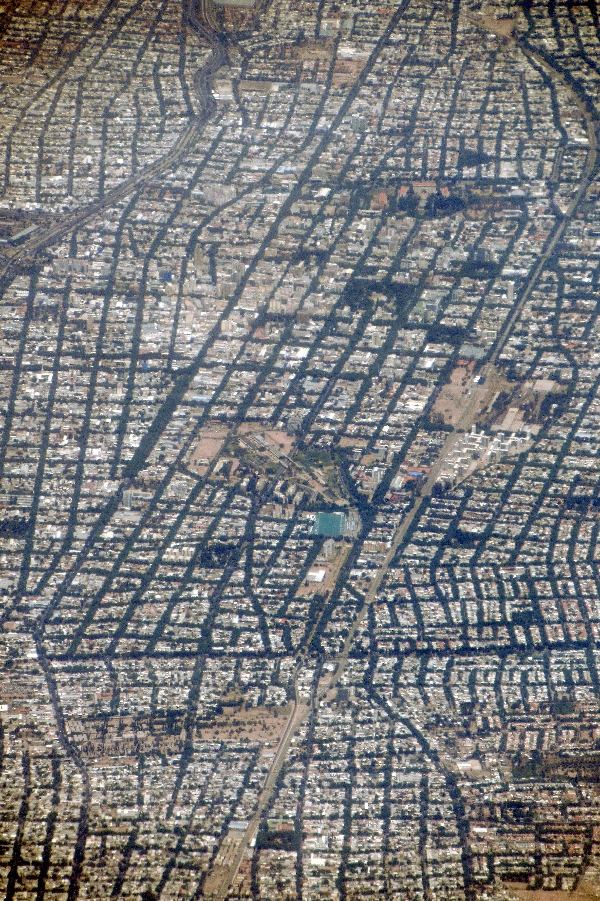 Mendoza centro (770 m s.n.m., distancia hasta la plaza 28 km aprox., altitud de vuelo 11600 m s.n.m.).